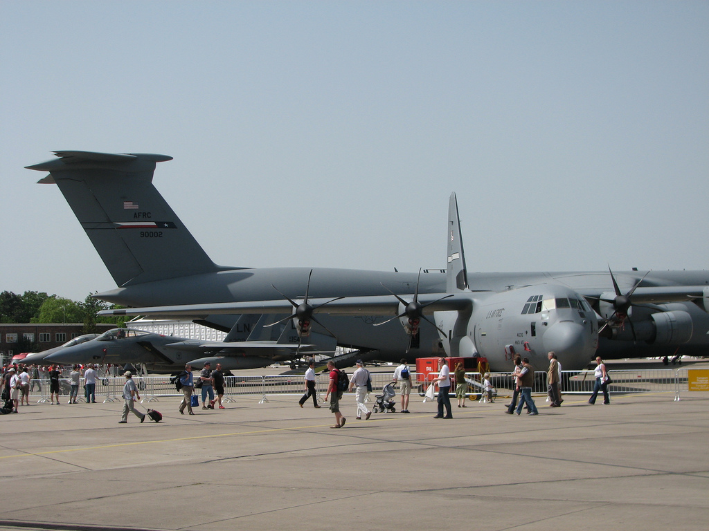 Eine C-130 Hercules und das Heck einer C-5 Galaxy